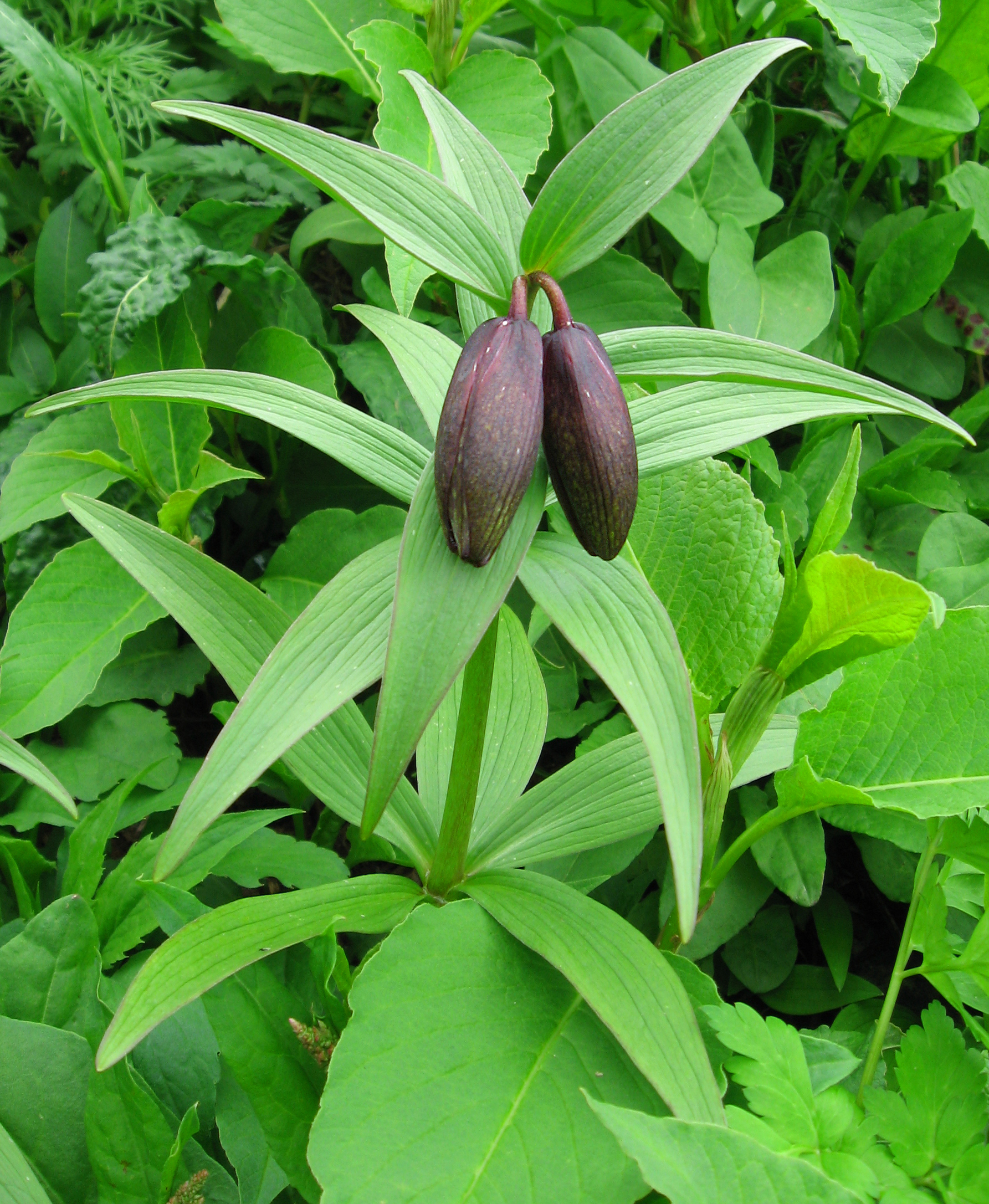 ミヤマクロユリ (Fritillaria camschatcensis ssp. alpina)